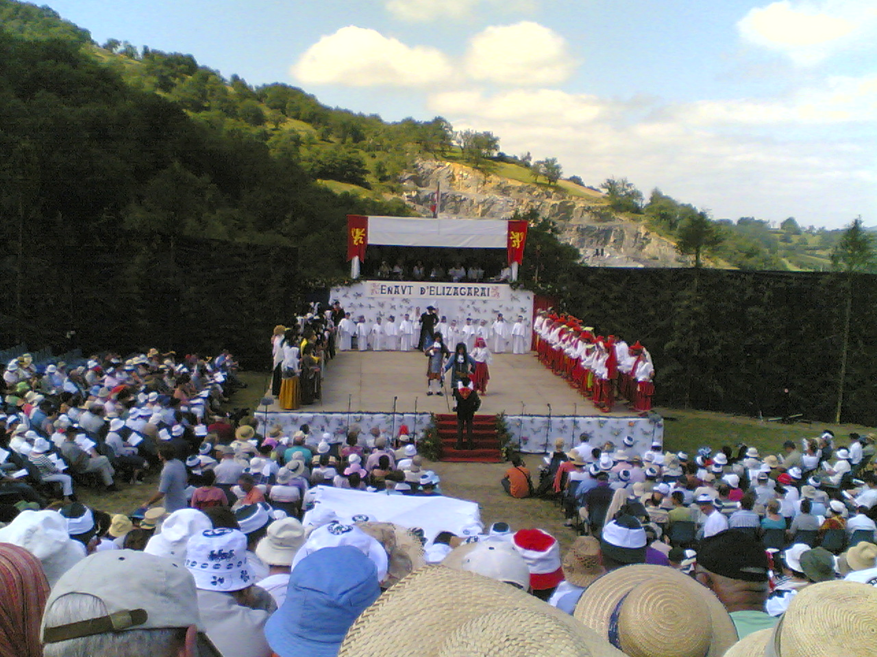 Pastorale 29 juillet 2007 à Camou-Cihigue